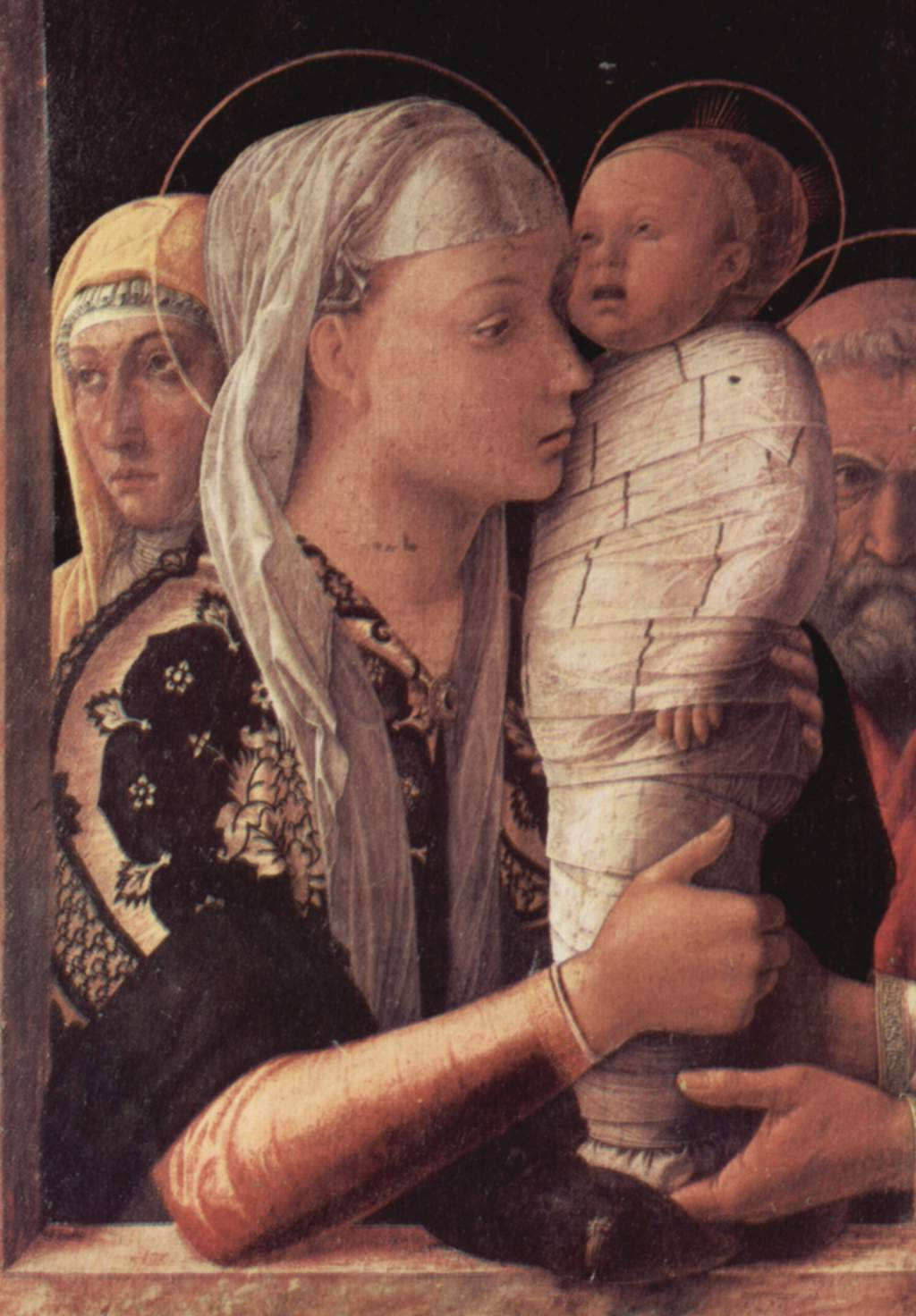 detail: Maria mit Kind